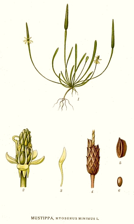 Original Description Mustippa, Myosurus minimus L.